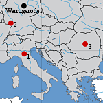 Karte Südosten Europas, mit Partnerstädten von Wernigerode (1-Carpi, 2-Neustadt a.d.W., 3-Cisnădie